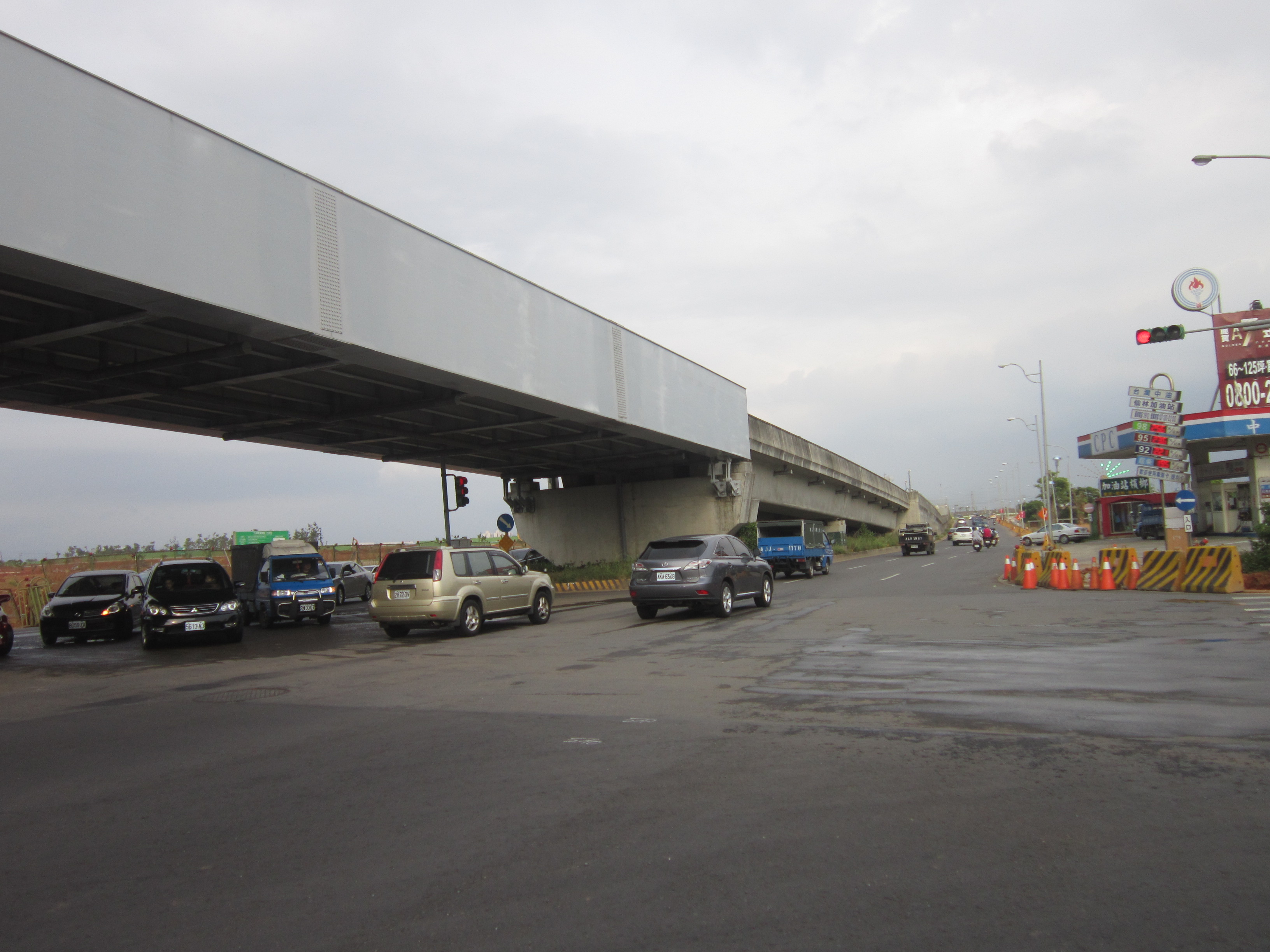 桃園機場捷運於龜山區段是架設在文化一路中央正上方，但在過了華亞三路口之後，開始隱沒入地下。